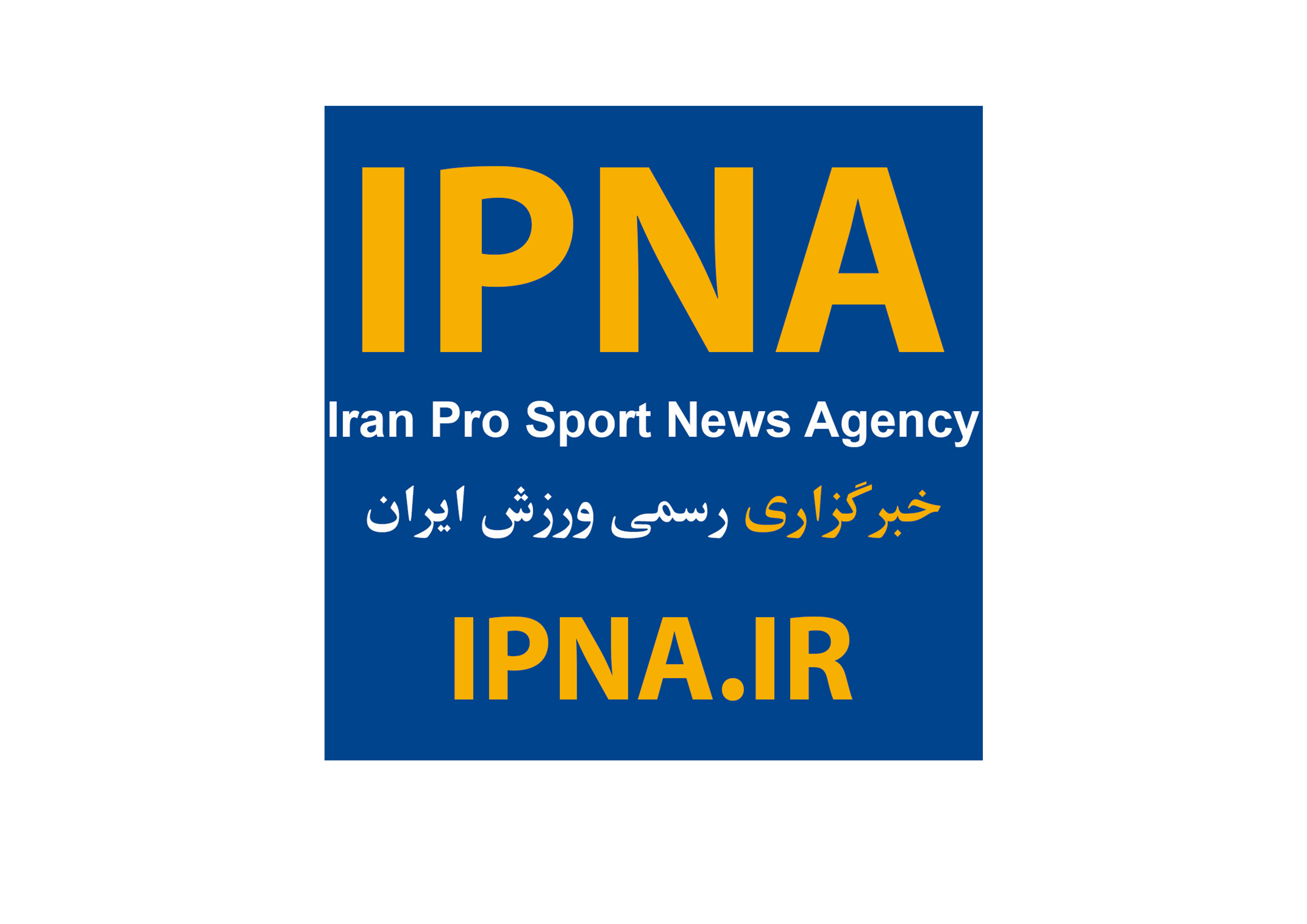 خبرگزاری رسمی ورزش ایران